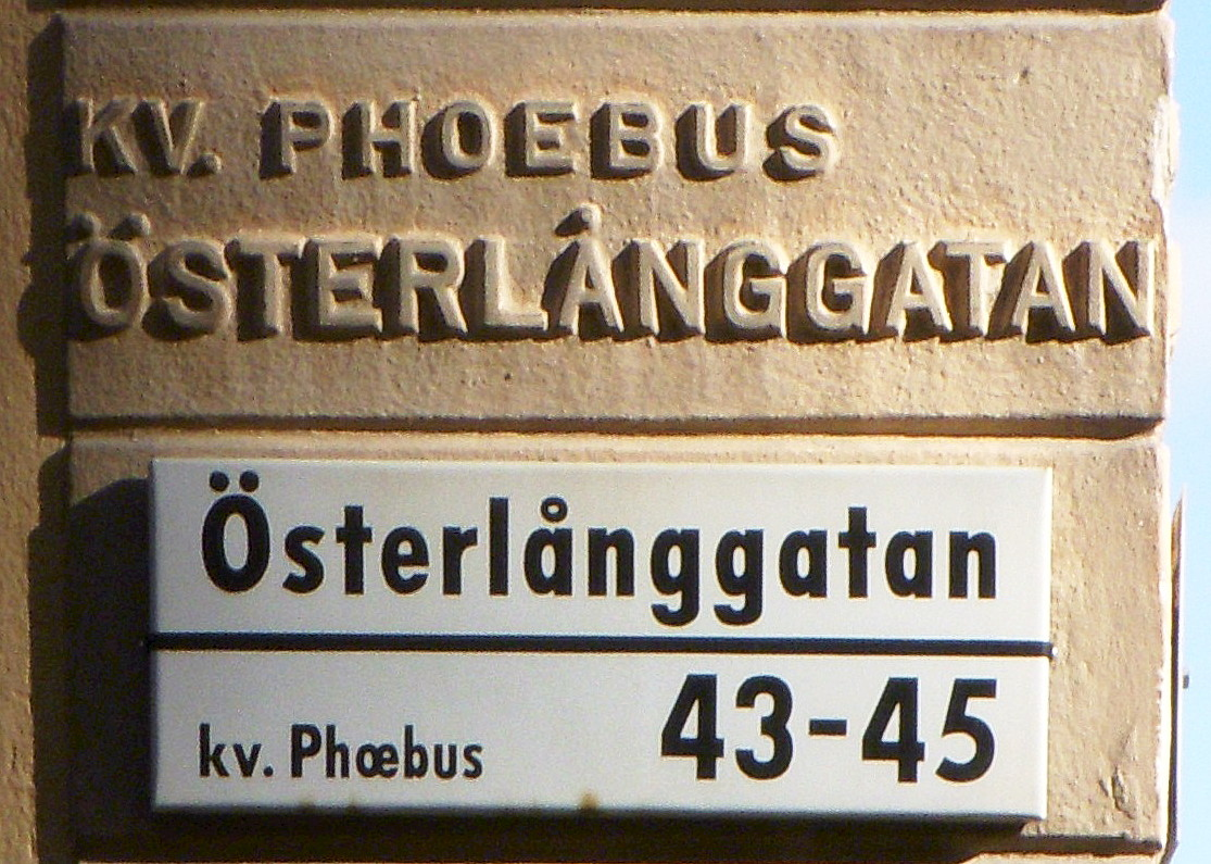 Österlånggatan 43-47, kv Phoebus, Gamla stan